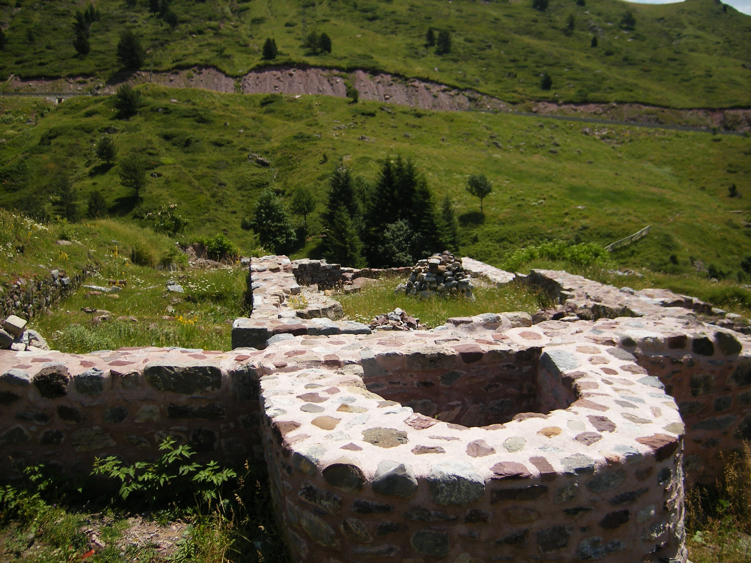 Aragonés: "Espital de Santa Cristina de Somport", Candanchú, Aragón.